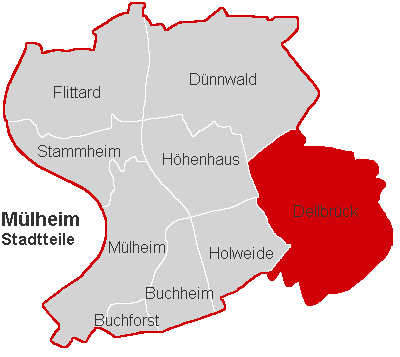 Lagekarte Dellbrück im Stadtbezirk Köln-Mülheim